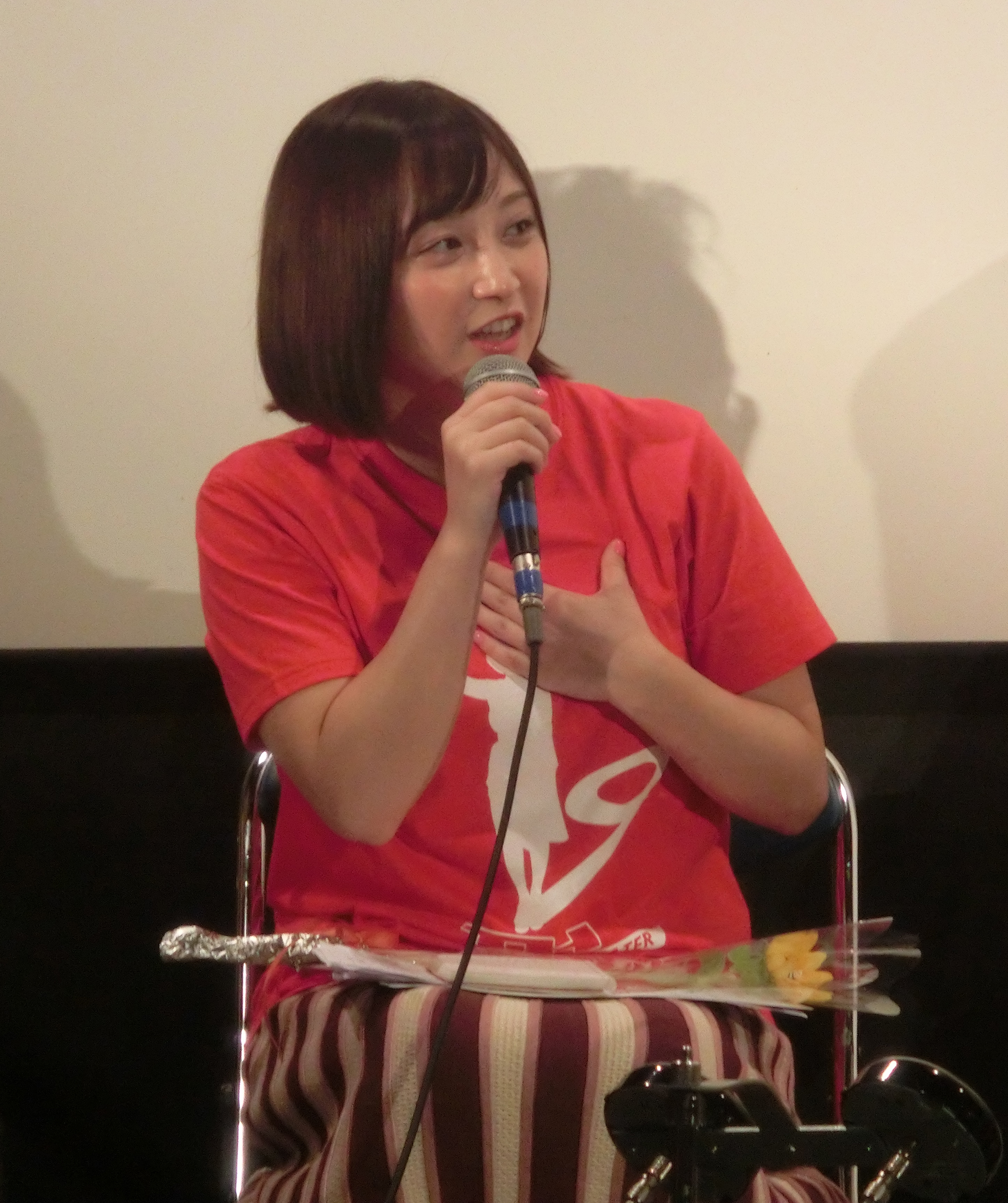 上野オークラ劇場2019年8月10日舞台挨拶